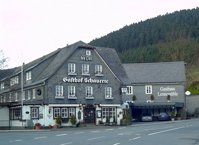 Oberkirchen, Gasthof Schauerte, an der B 236, Germany.